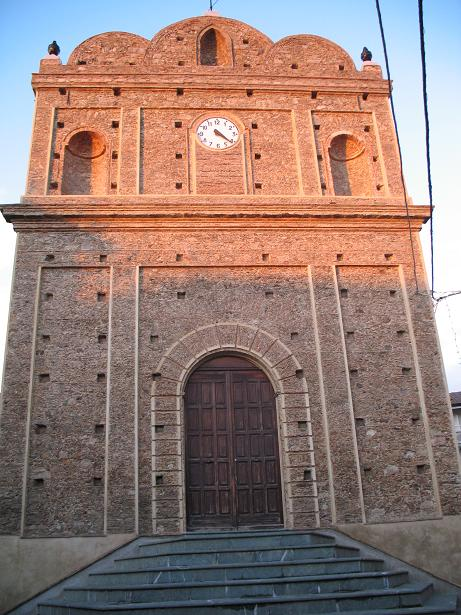 Antonino Della Porta